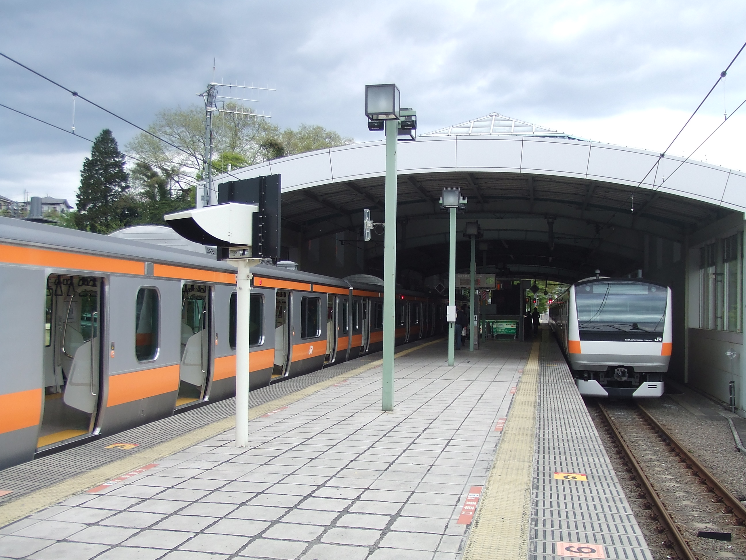 武蔵五日市駅